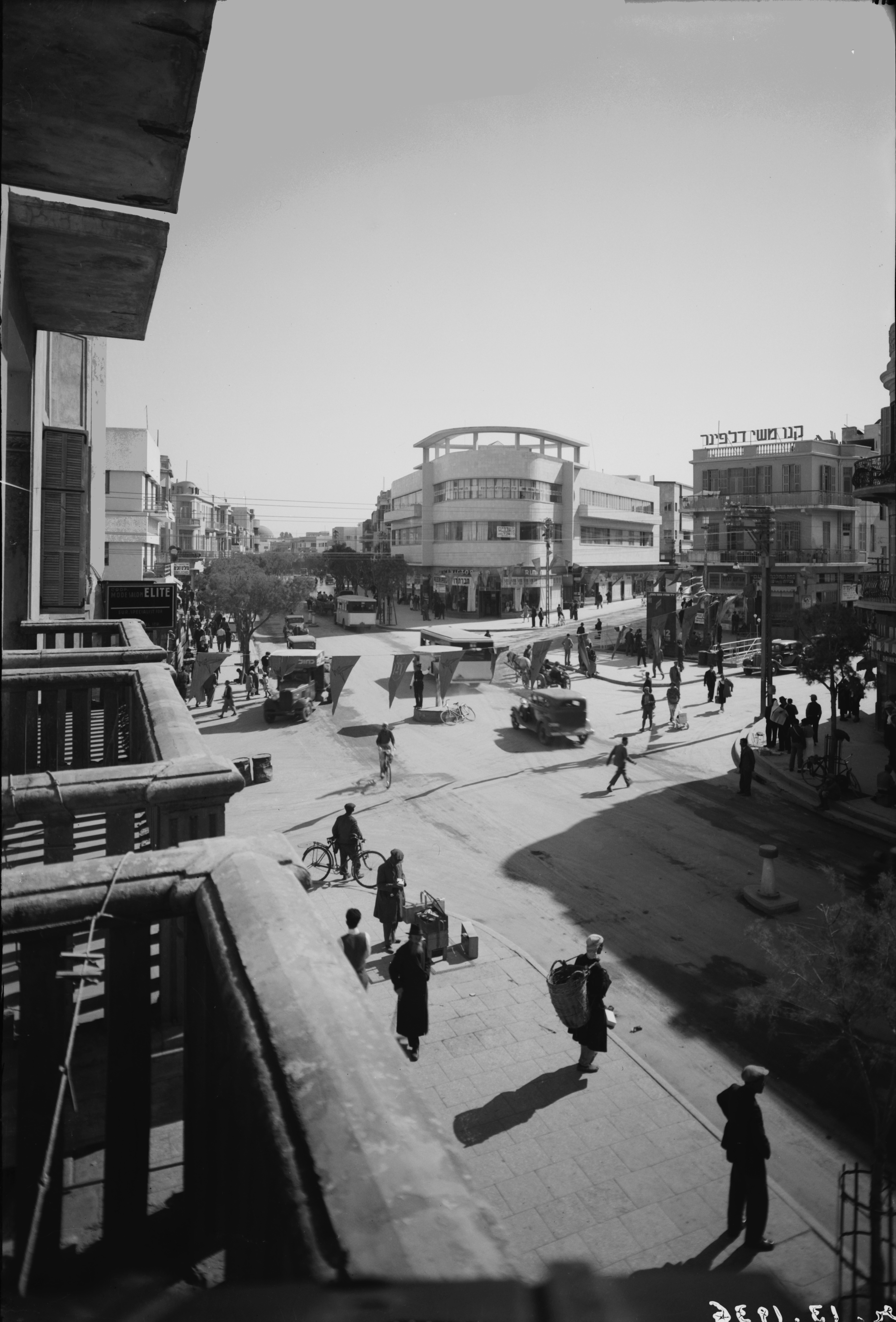 Tel Aviv - Magen David Square - 1936